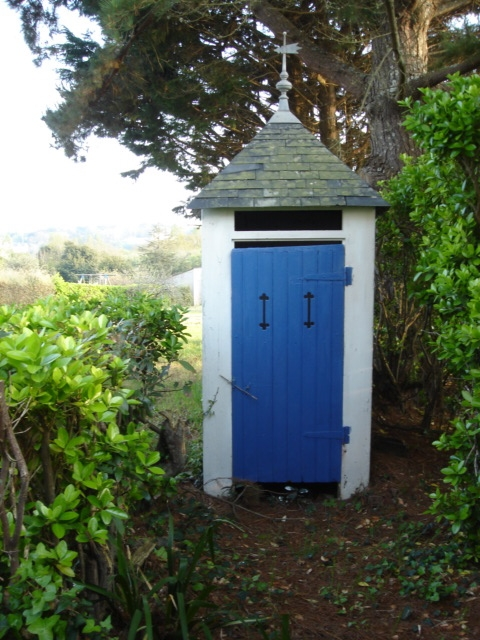 WC exterieur avec toiture d'ardoise au Palais, Morbihan.